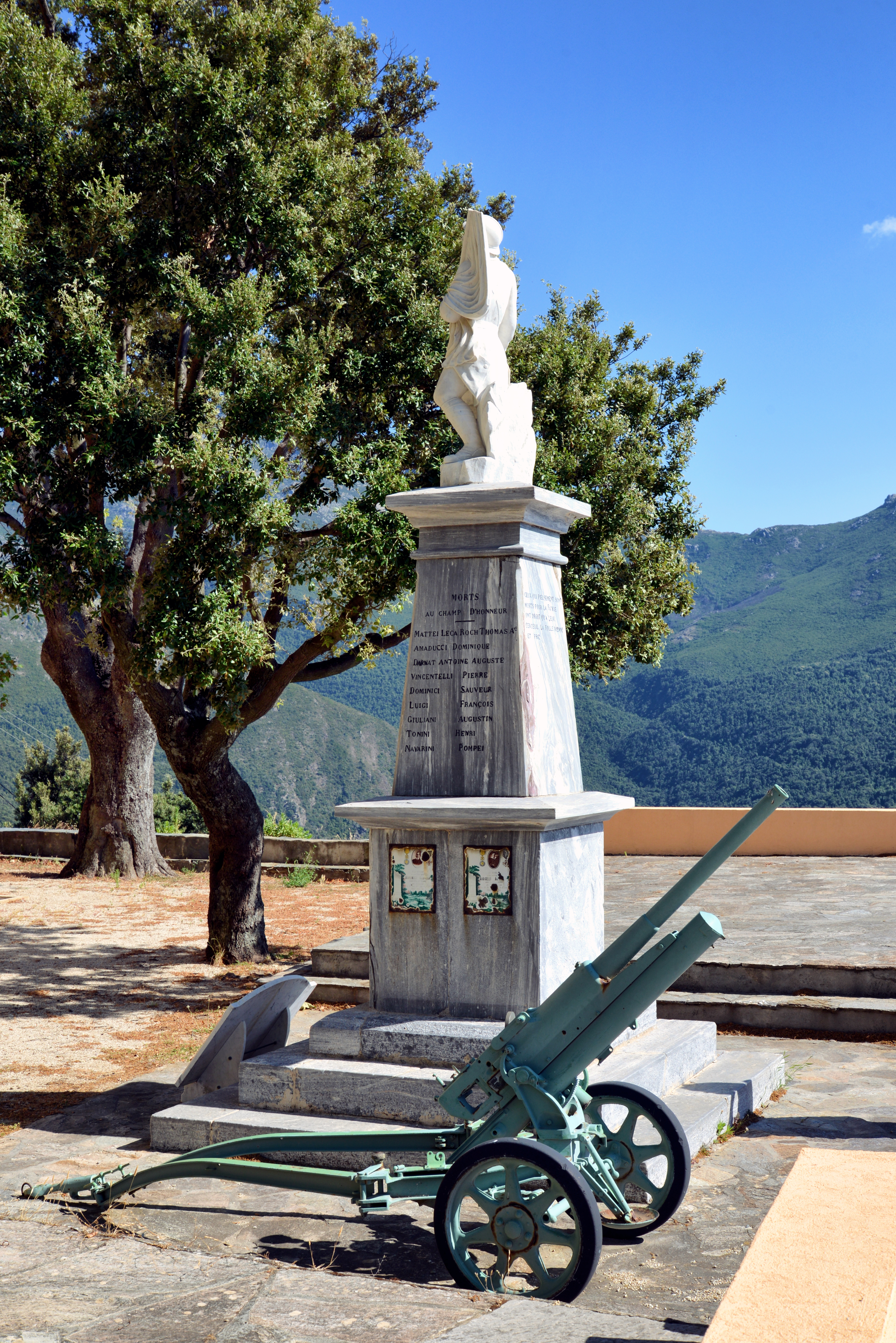 Barrettali, Cap Corse - Monument aux morts